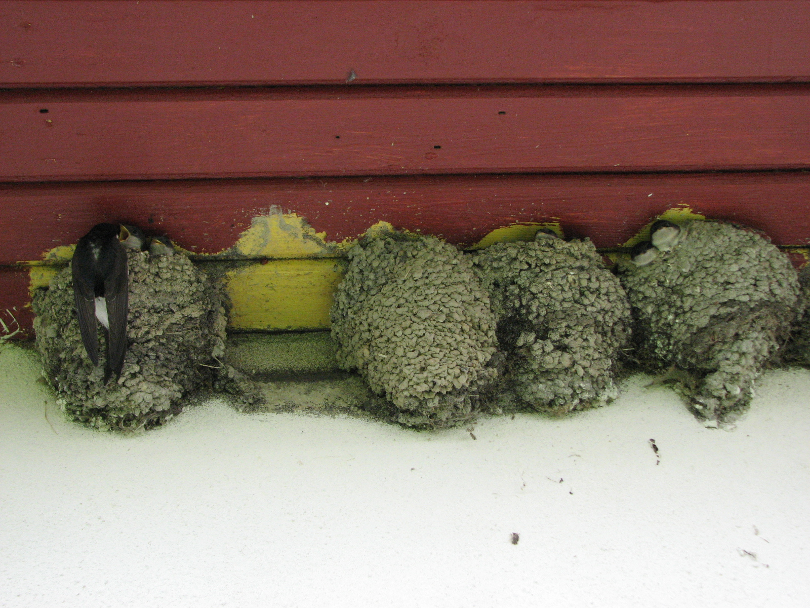 Delichon urbica. 2008, Sõru, Hiiumaa, Estonia